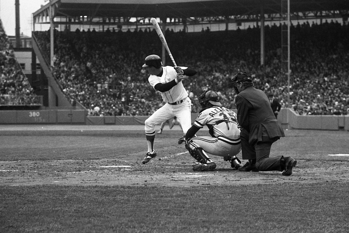 Carl Yastrzemski Boston Red Sox. 1970's